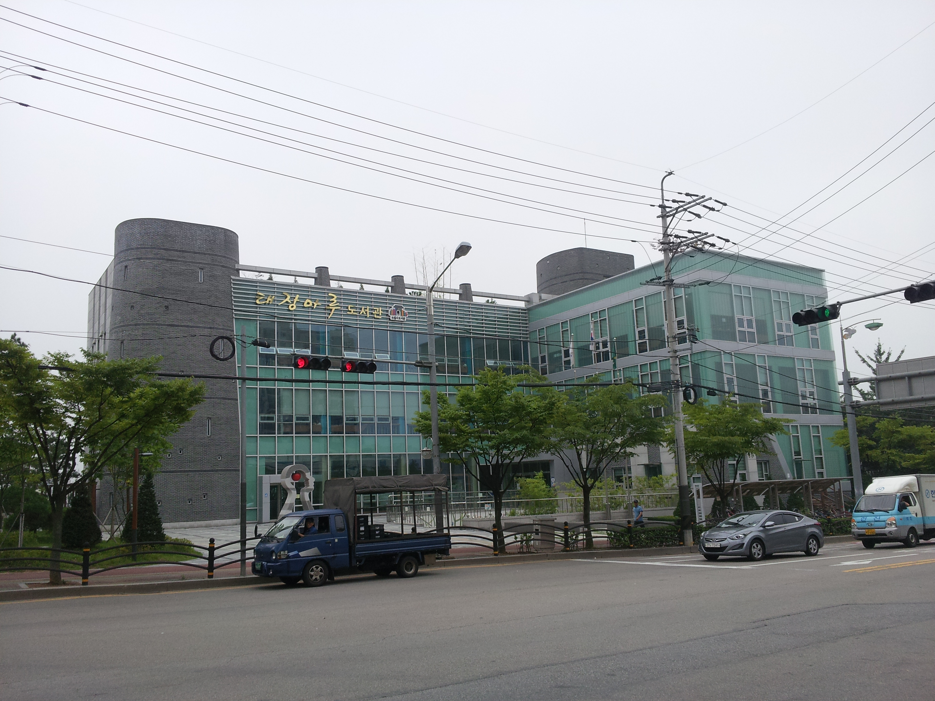 태장마루도서관